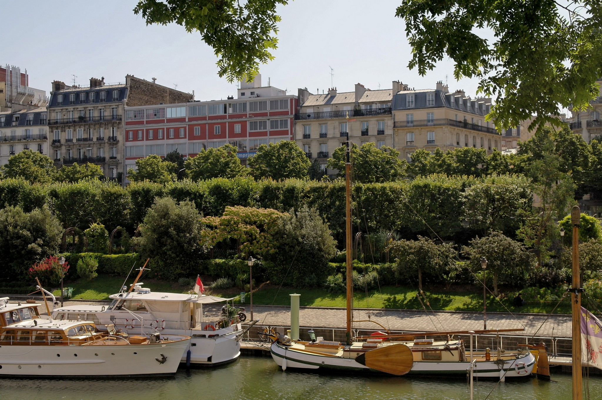 Bassin de l'Arsenal